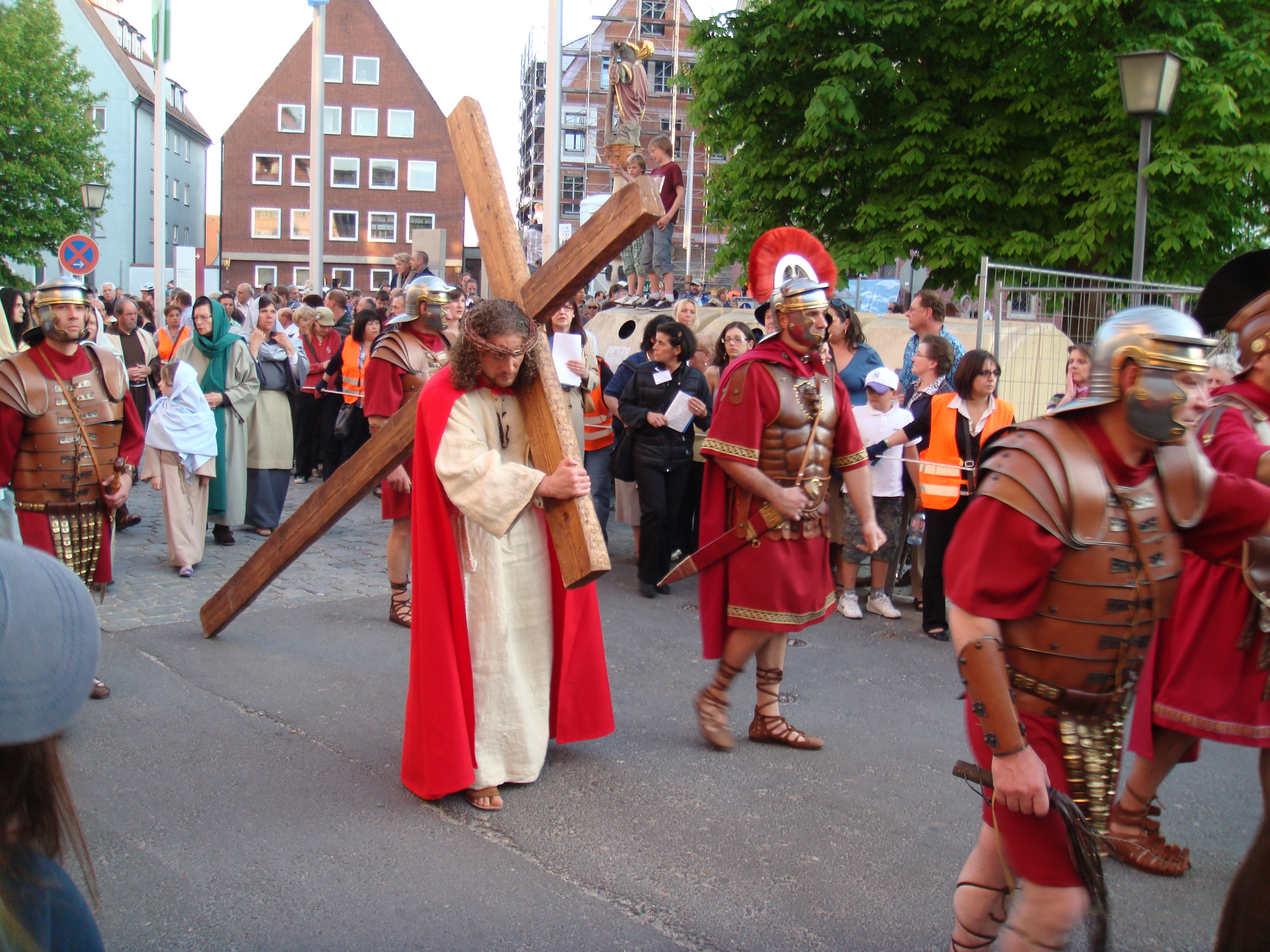 Auf dem Weg zur Kreuzigung.